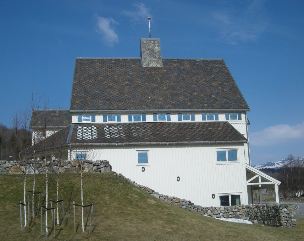 Bykle nye kirke, Setesdal